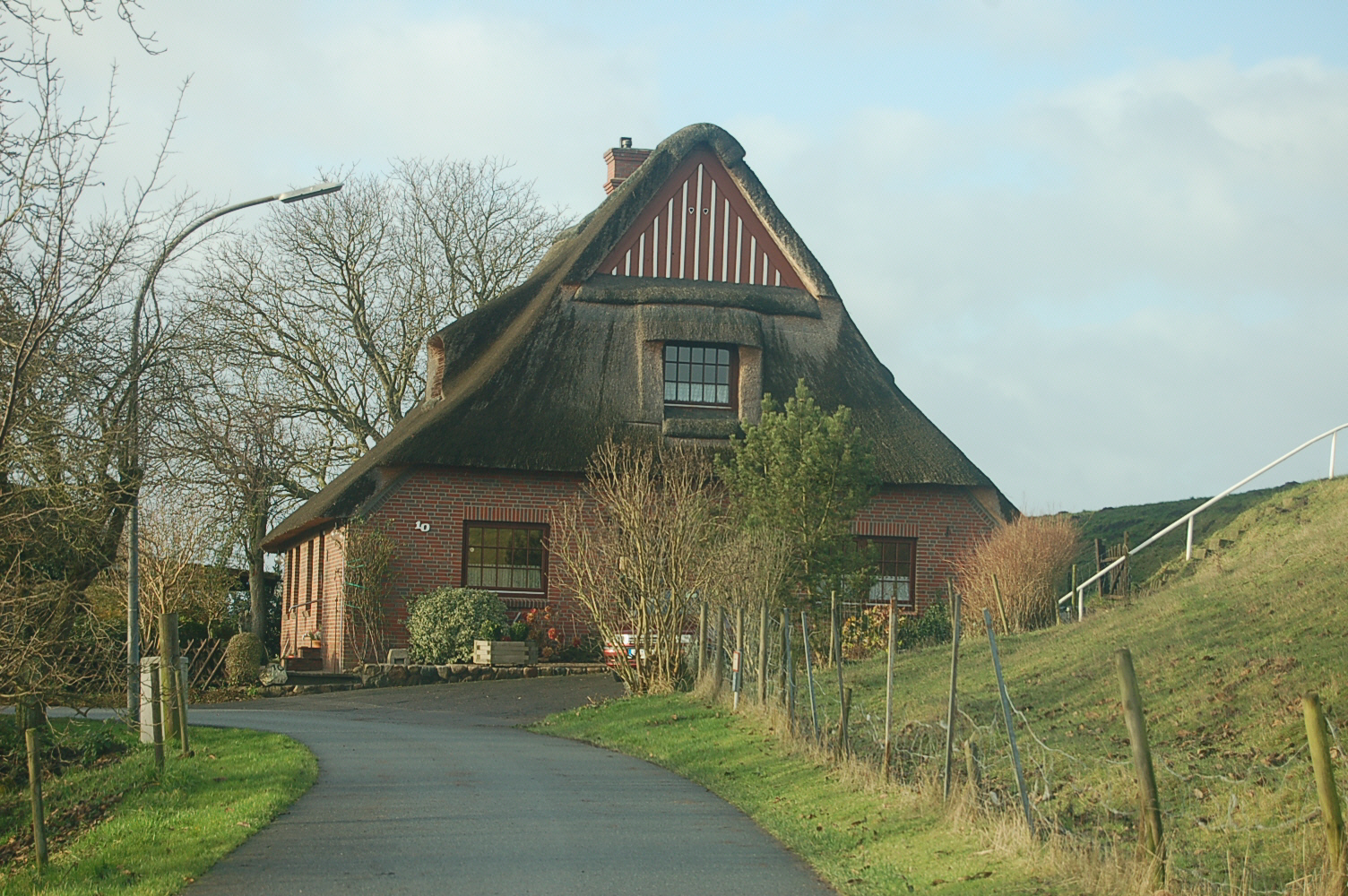 Moorrege, Stadtkoppelweg 10, Reetdachhaus am Pinnaudeich